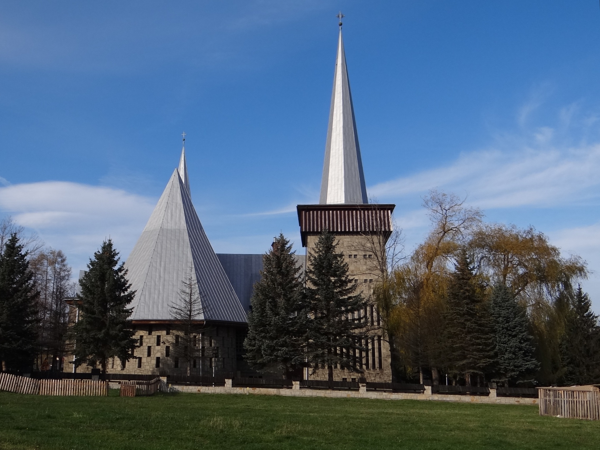 Tęgoborze 12 - rzymskokatolicki kościół parafialny pw. św. Stanisława Biskupa